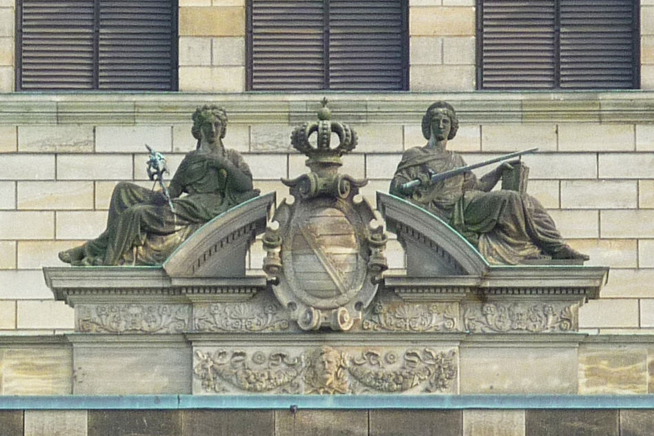 Königswappen mit der Skulptur Frieden und Gerechtigkeit an der Westfassade der Semperoper in Dresden, darunter Porträtkopf von Gottfied Semper